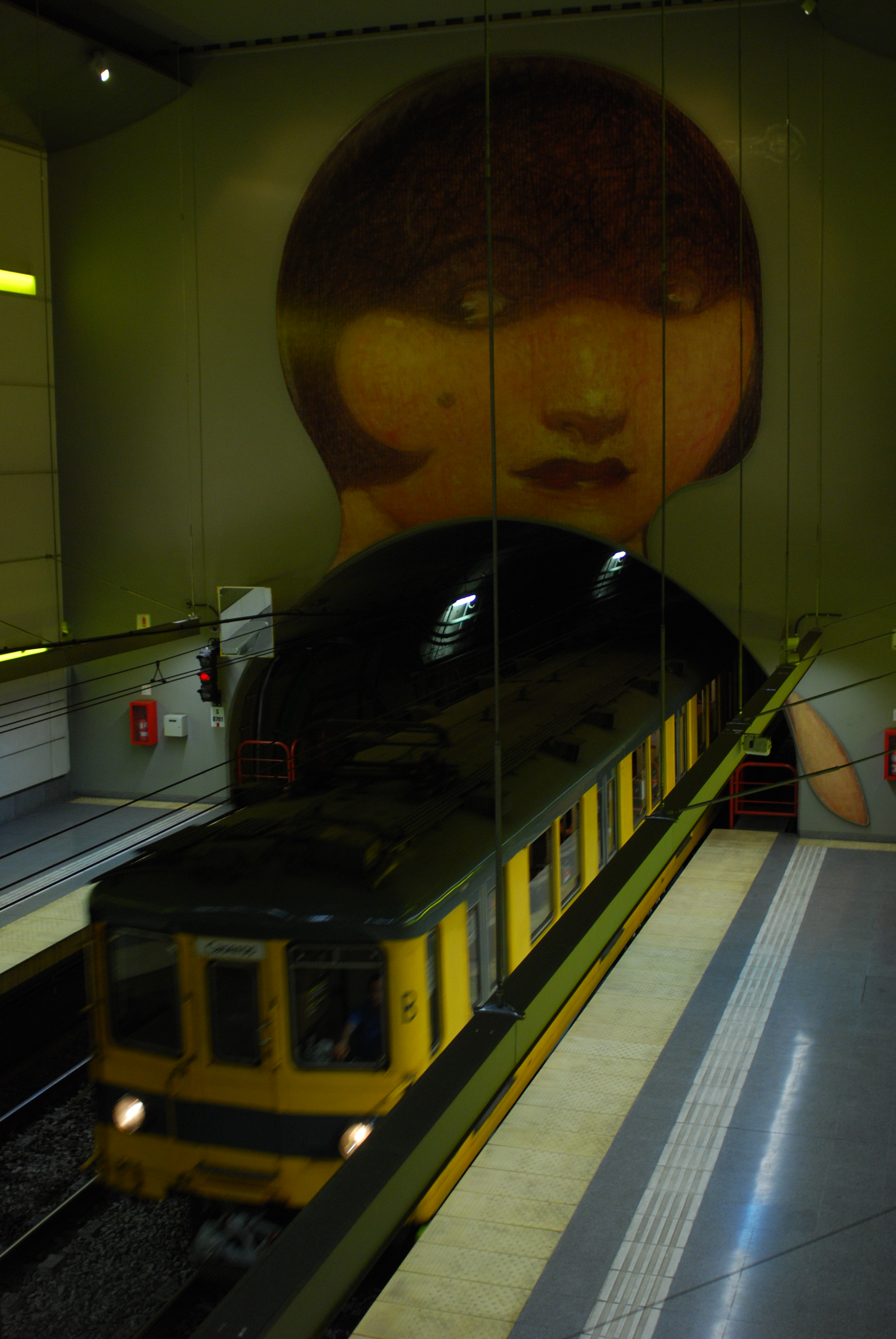 Línea H de subtes en Buenos Aires, tren saliendo del túnel por debajo del mural en la estación Venezuela (Argentina, noviembre 2008)